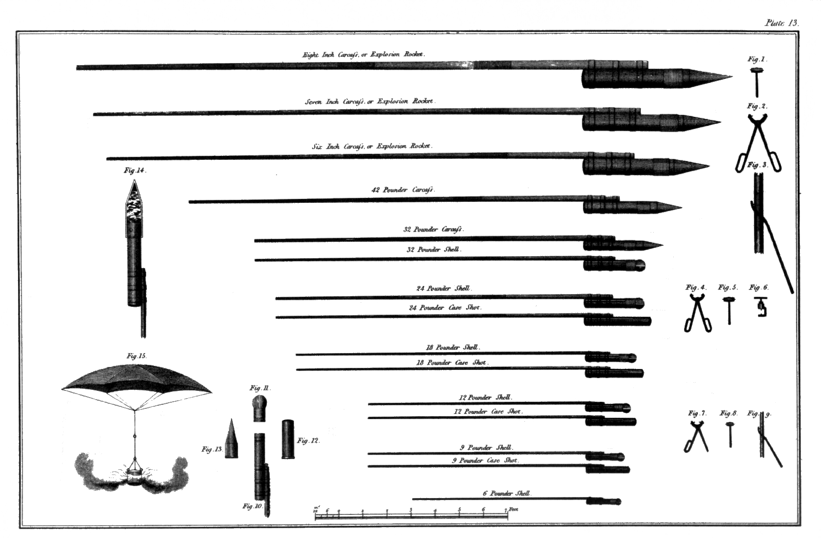 Raketenmodelle von William Congreve